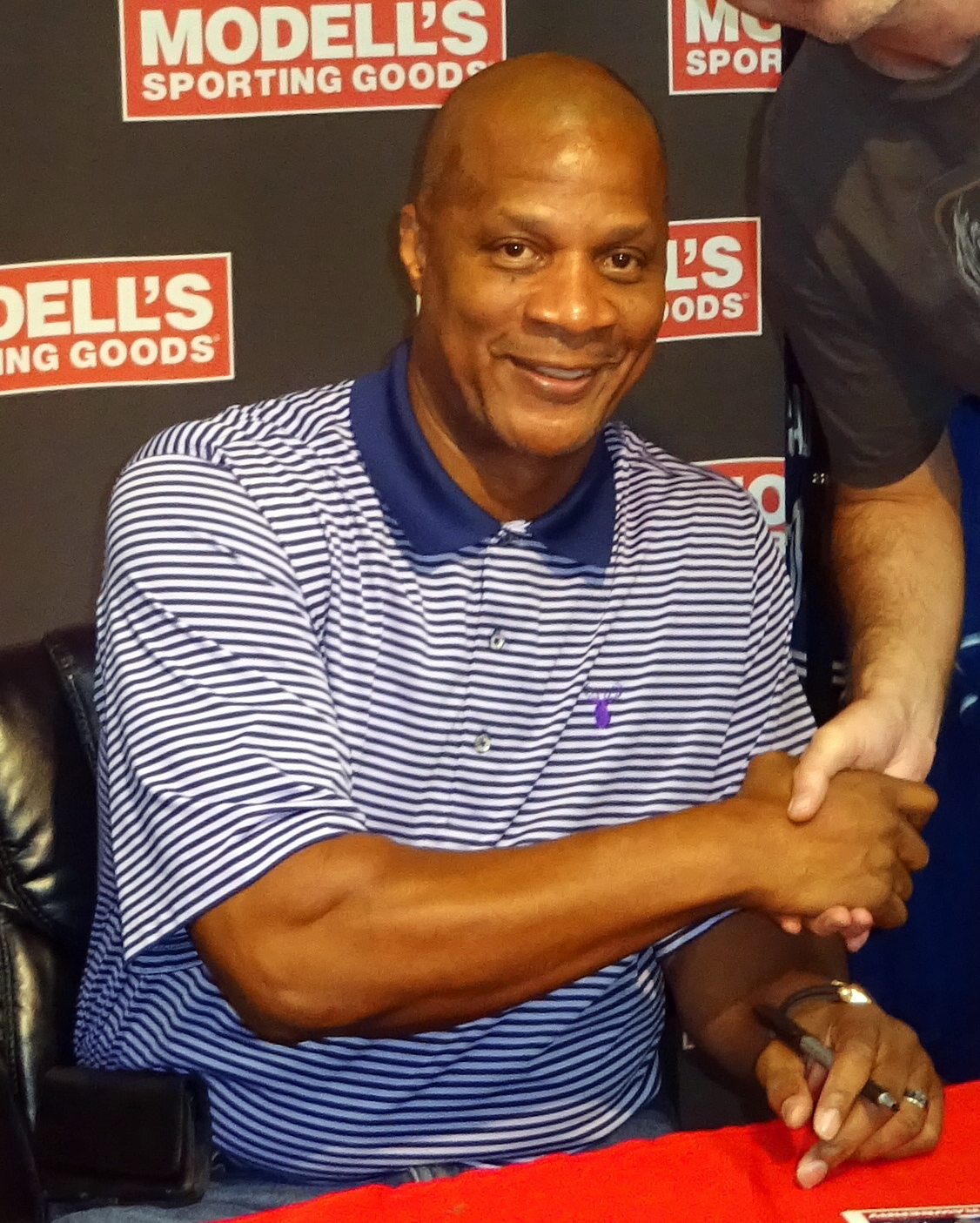 former big league slugger. August '16 NYC